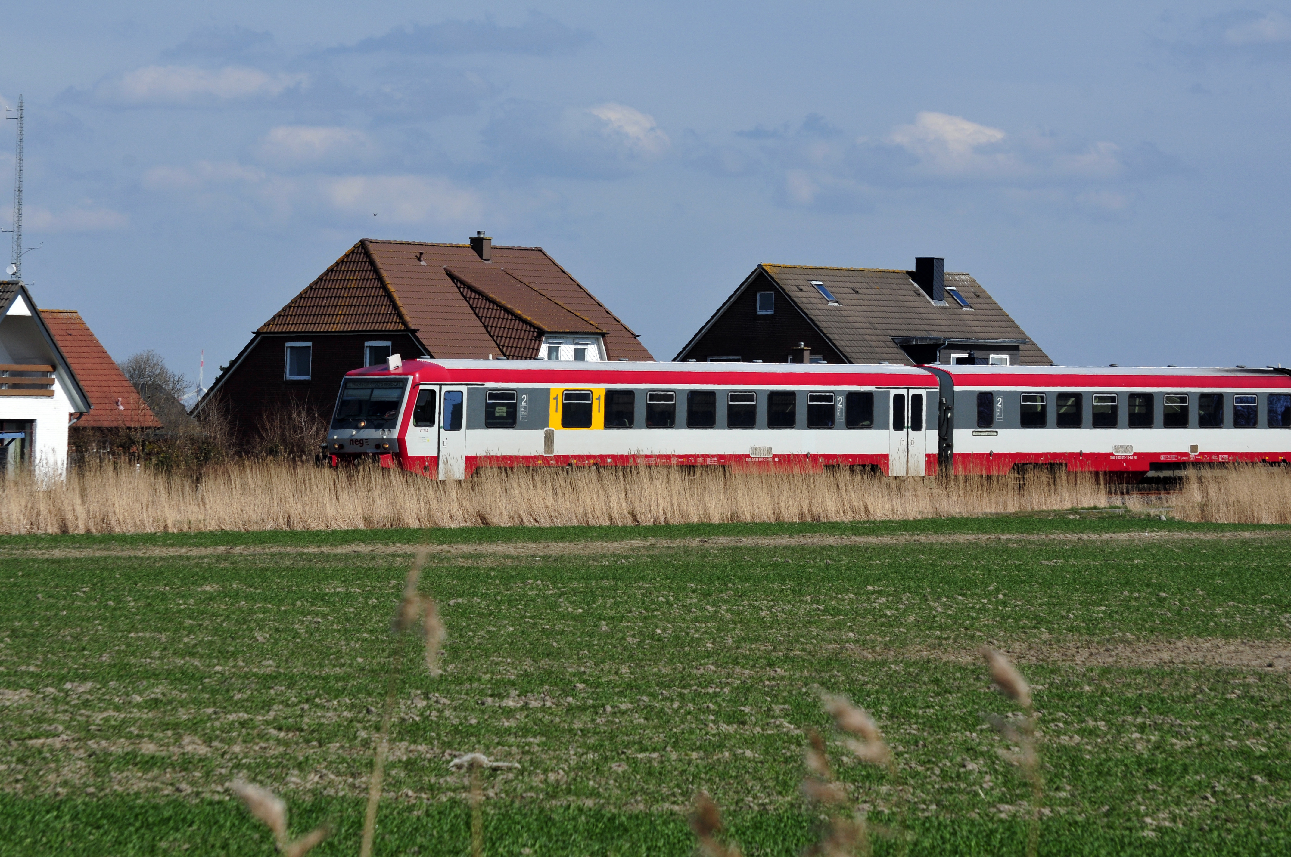 Dagebüll